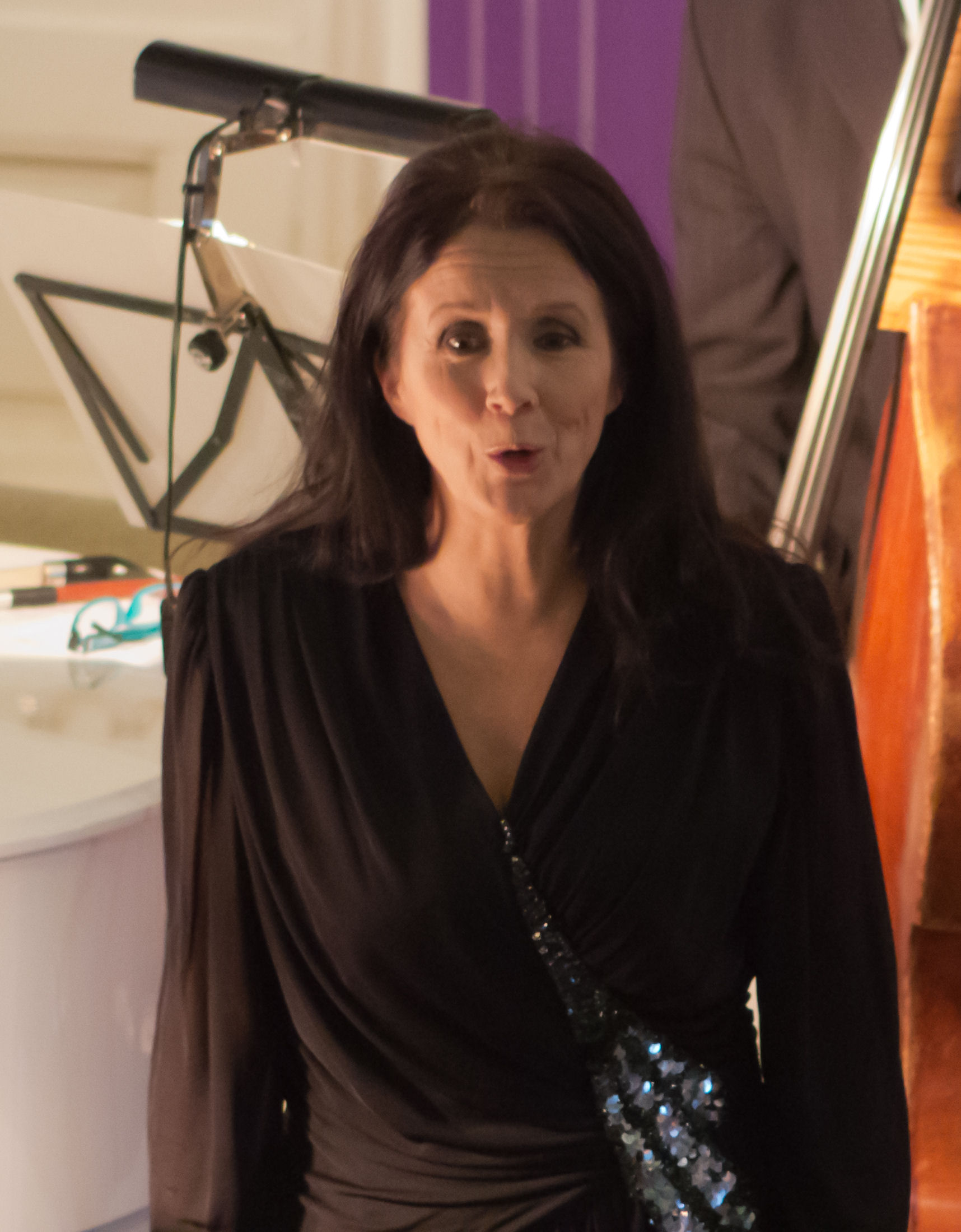 Johanna Tuomi, suomalainen laulaja